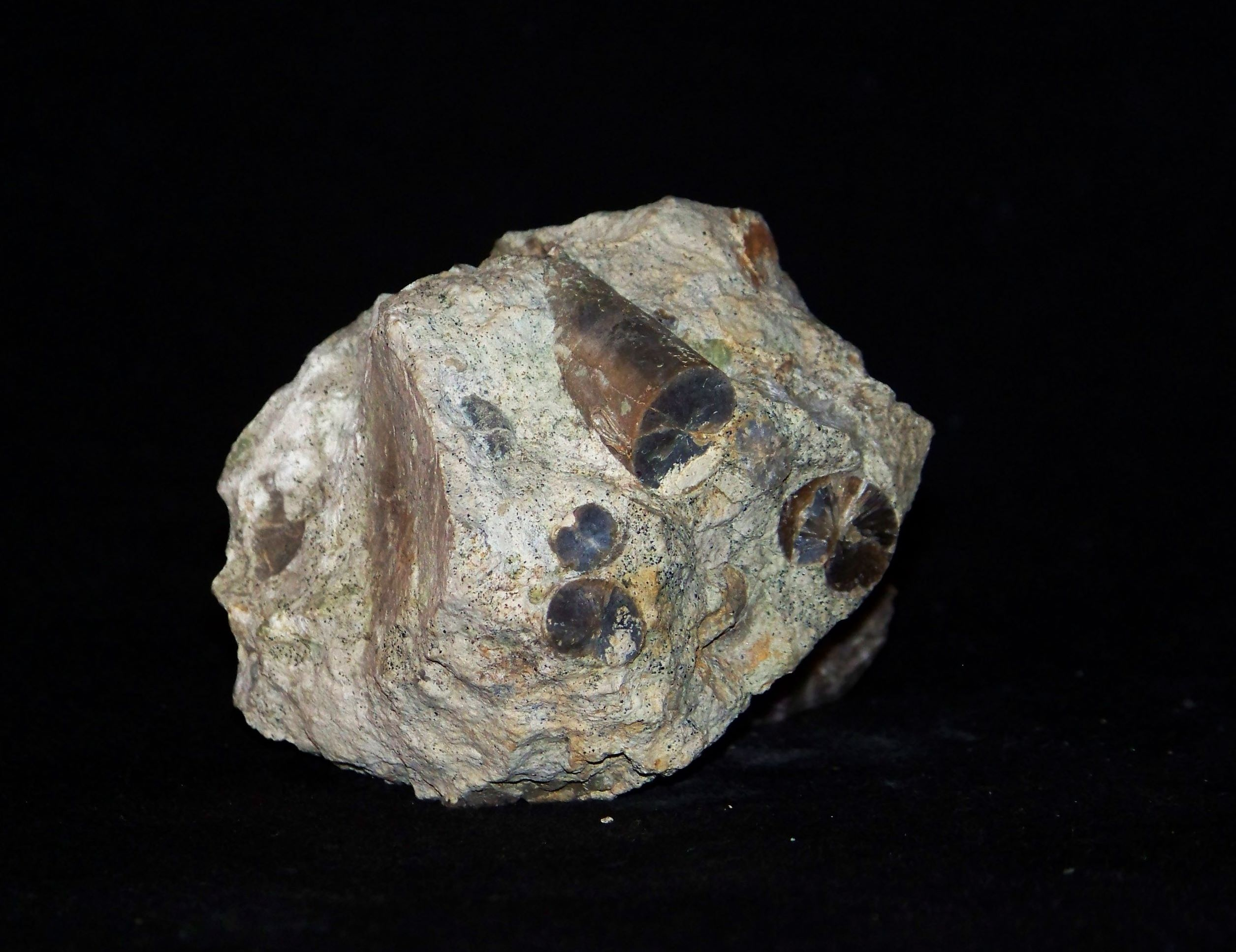 Wapien kelowejski z belemnitami, zhalmyrolizowany, Ogrodzieniec, Jura-Krak-Częst.